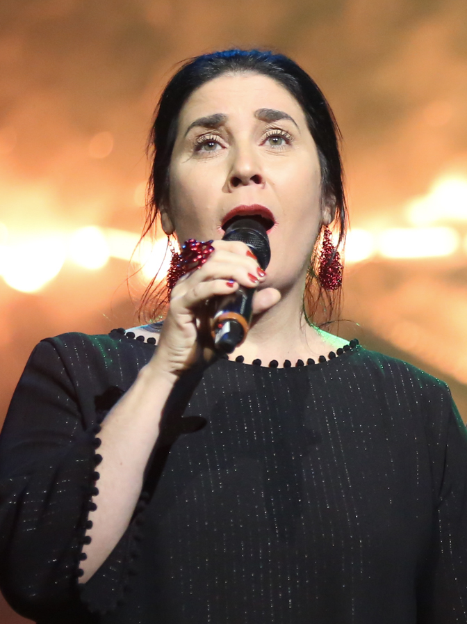 Monica Salmaso no 26° Prêmio da Música Brasileira 2015, no Theatro Municipal, no Centro do Rio de Janeiro/RJ. (10/06/15) Foto: Roberto Filho/Divulgacão